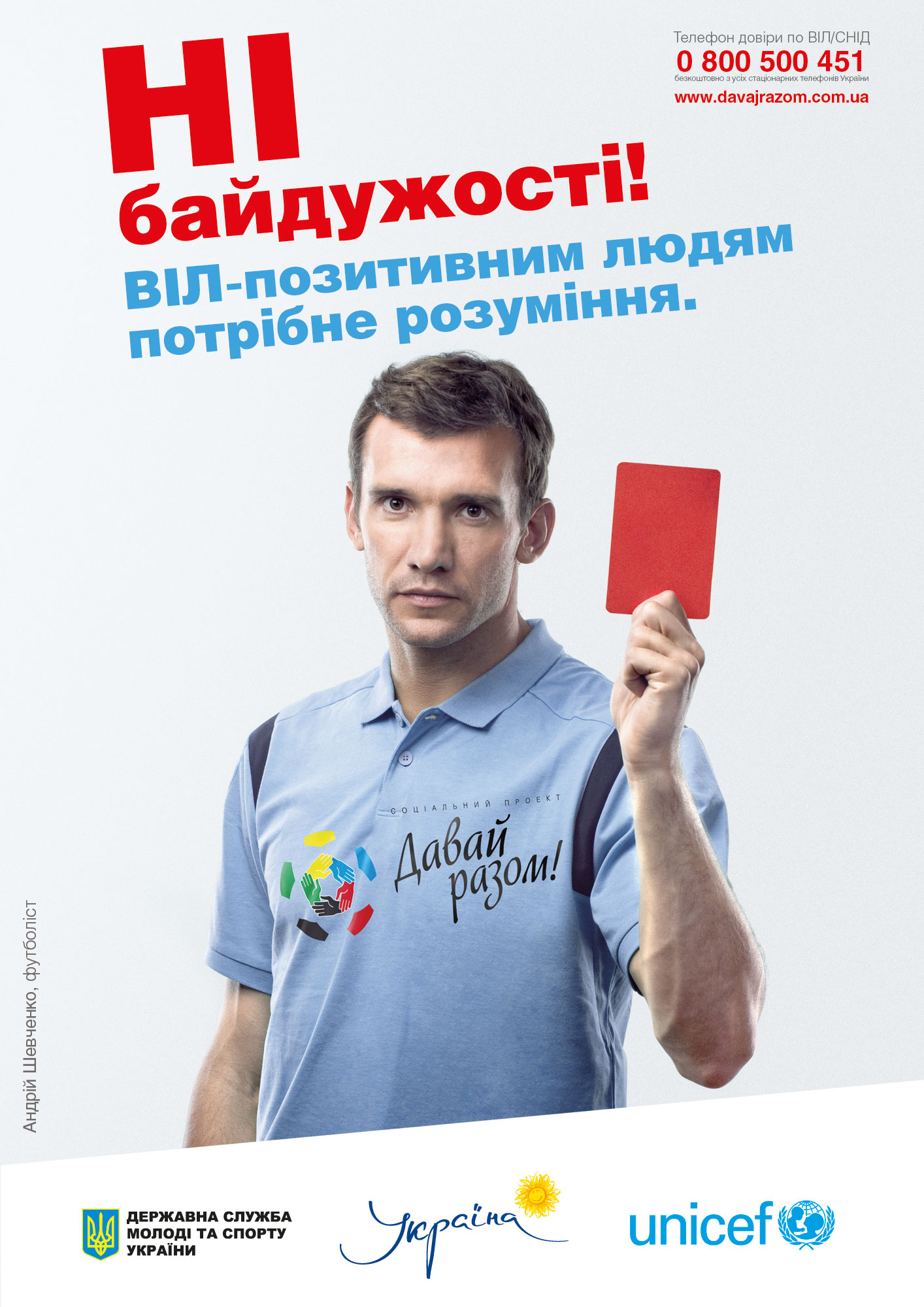 Відомі українські спортсмени та представники шоу-бізнесу: Ані Лорак, Василь Вірастюк, Гайтана та Андрій Шевченко показують червону картку головним проблемам молоді та закликають разом їх подолати.